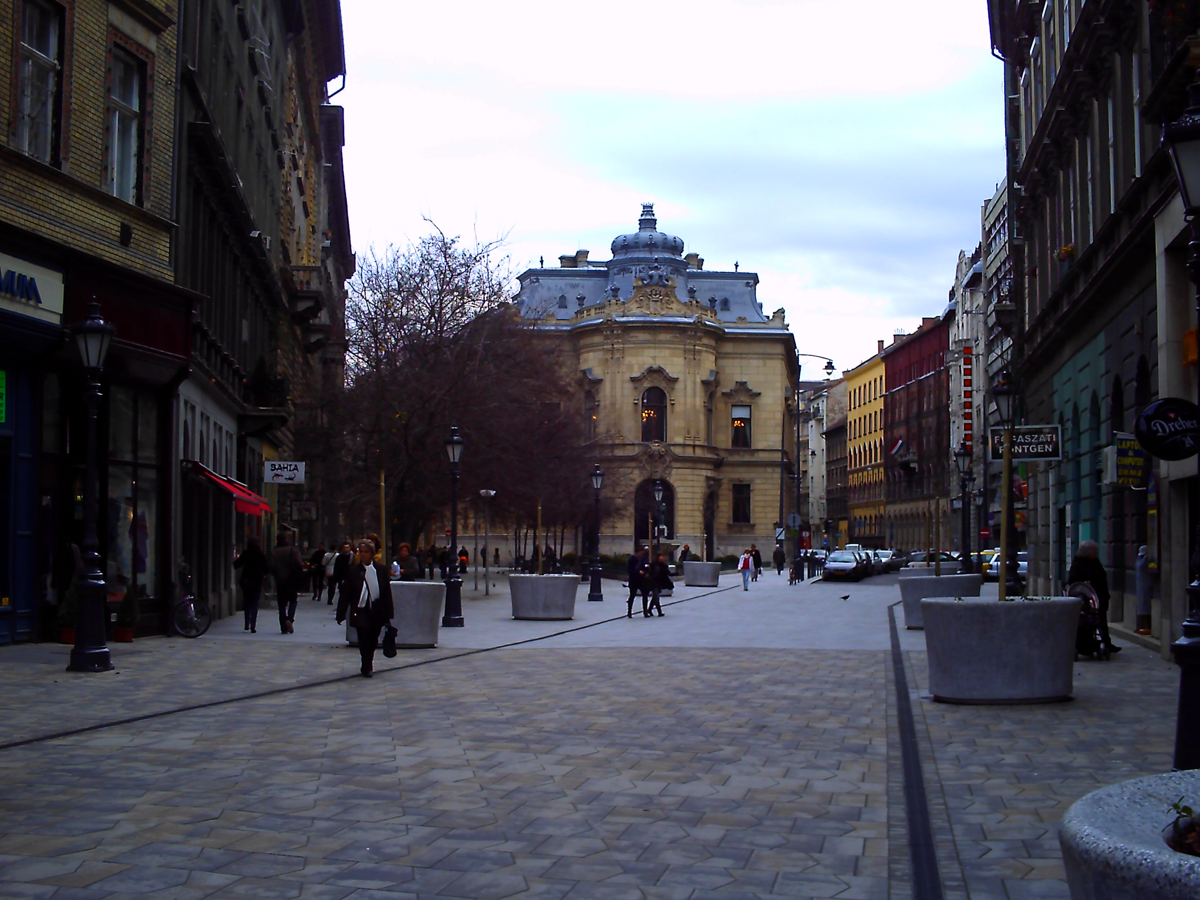 A budapesti Baross utca sétálóutcává alakított eleje, háttérben a Fővárosi Szabó Ervin Könyvtár